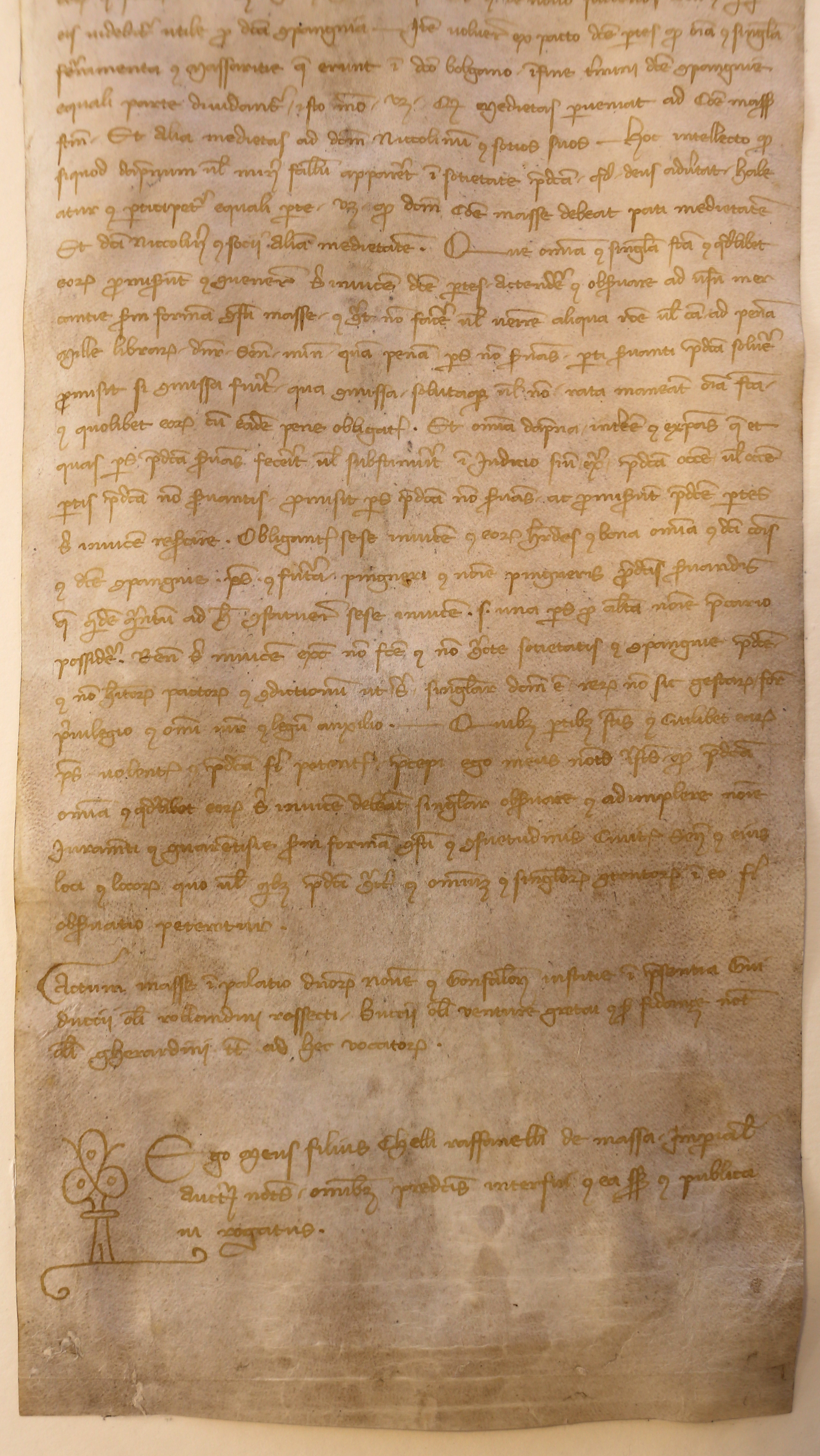 Museo di Arte Sacra (Massa Marittima) This is a photo of a monument which is part of cultural heritage of Italy.